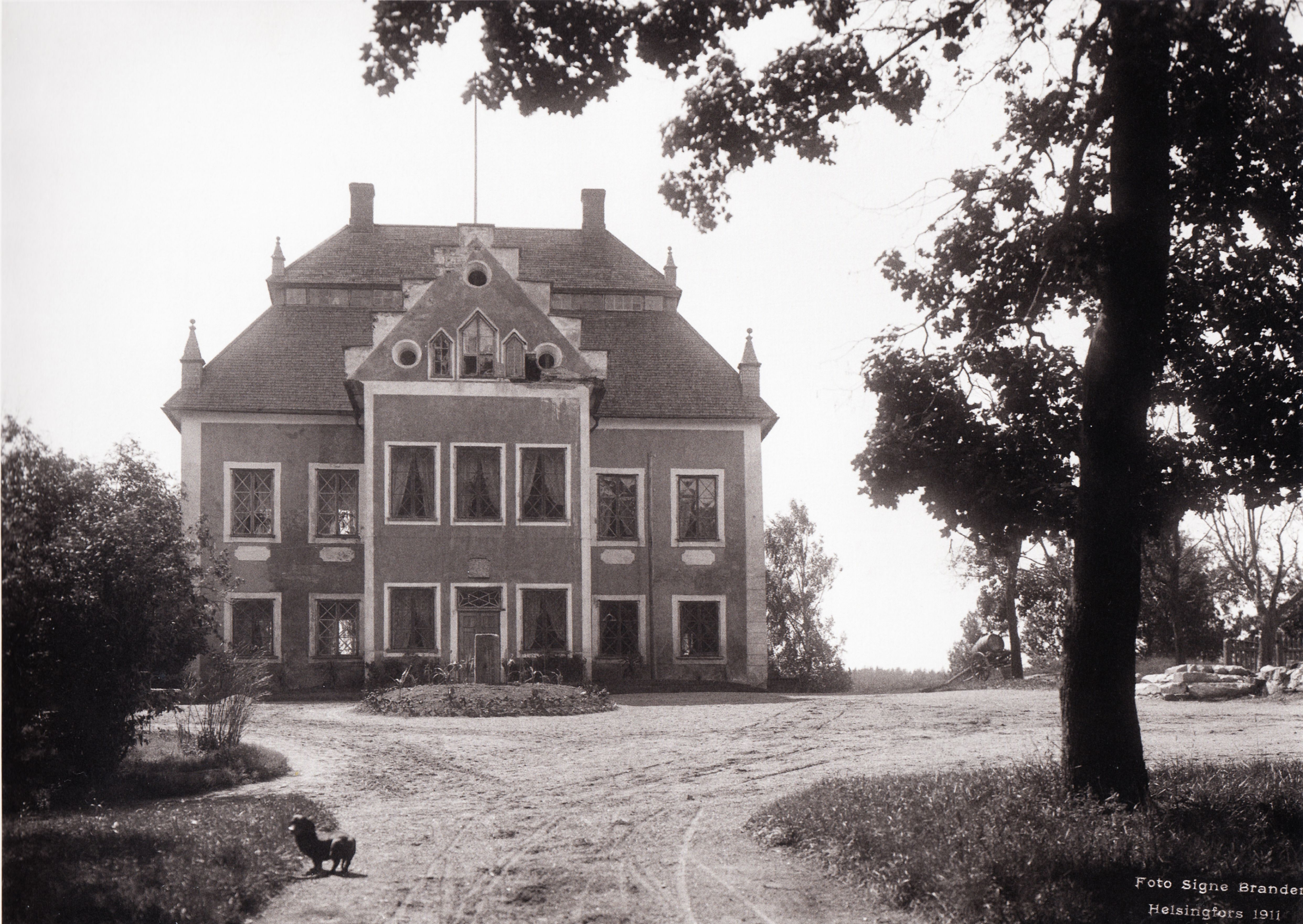 Karunan Kartano vuonna 1911